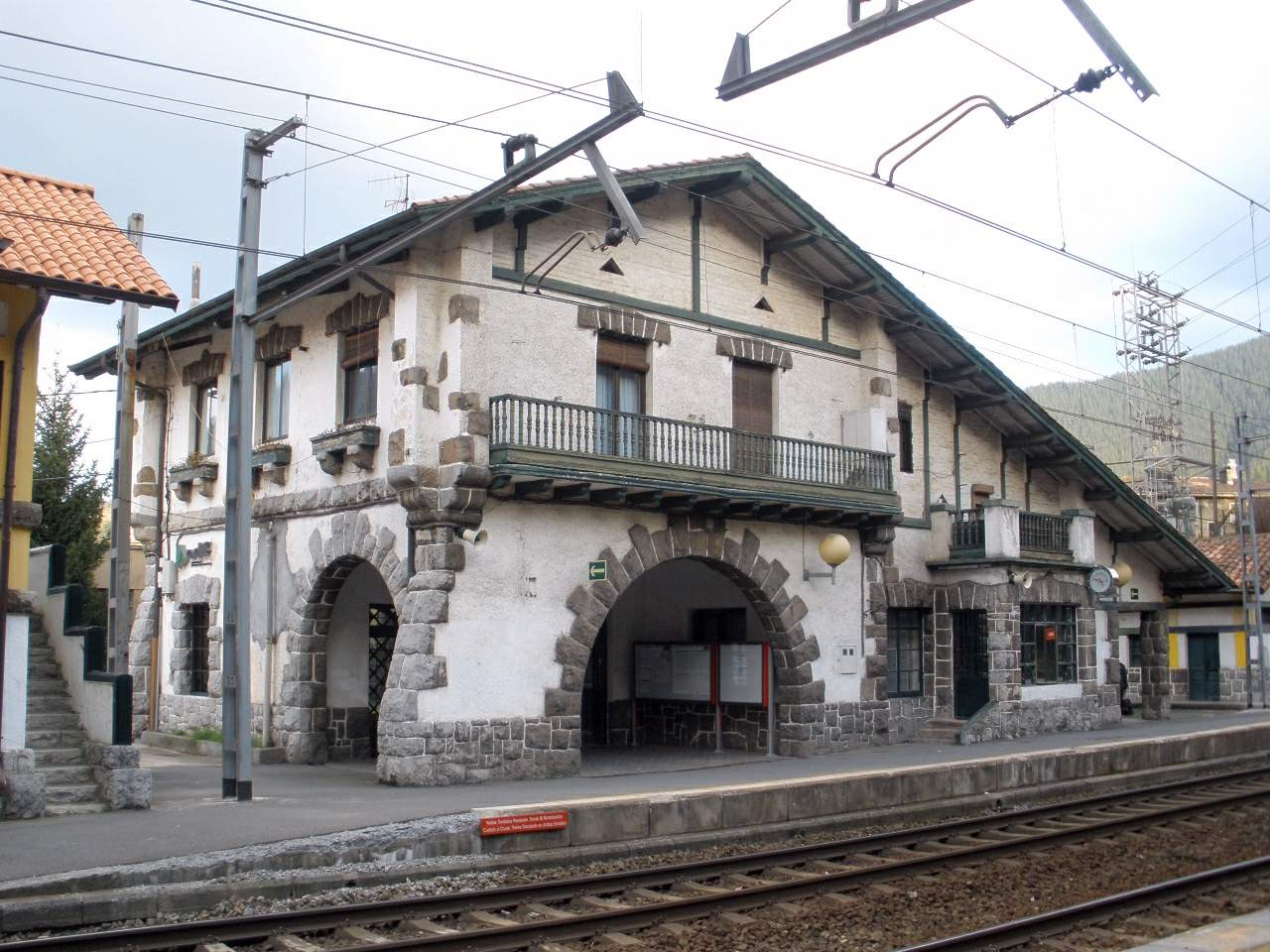 Barrio de Areta (Laudio/Llodio, Álava). Estación de Areta.